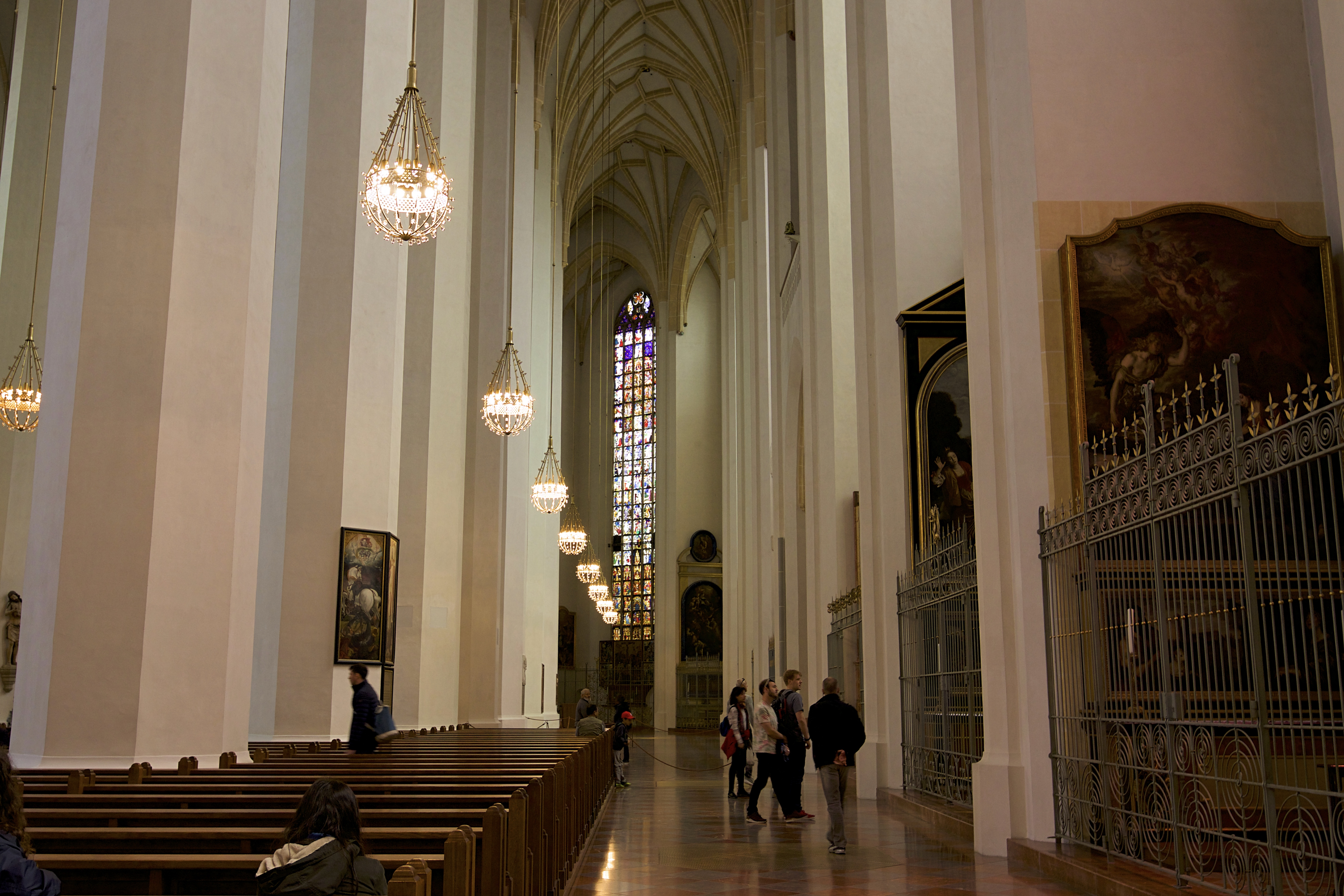 rechtes Seitenschiff der Frauenkirche in München